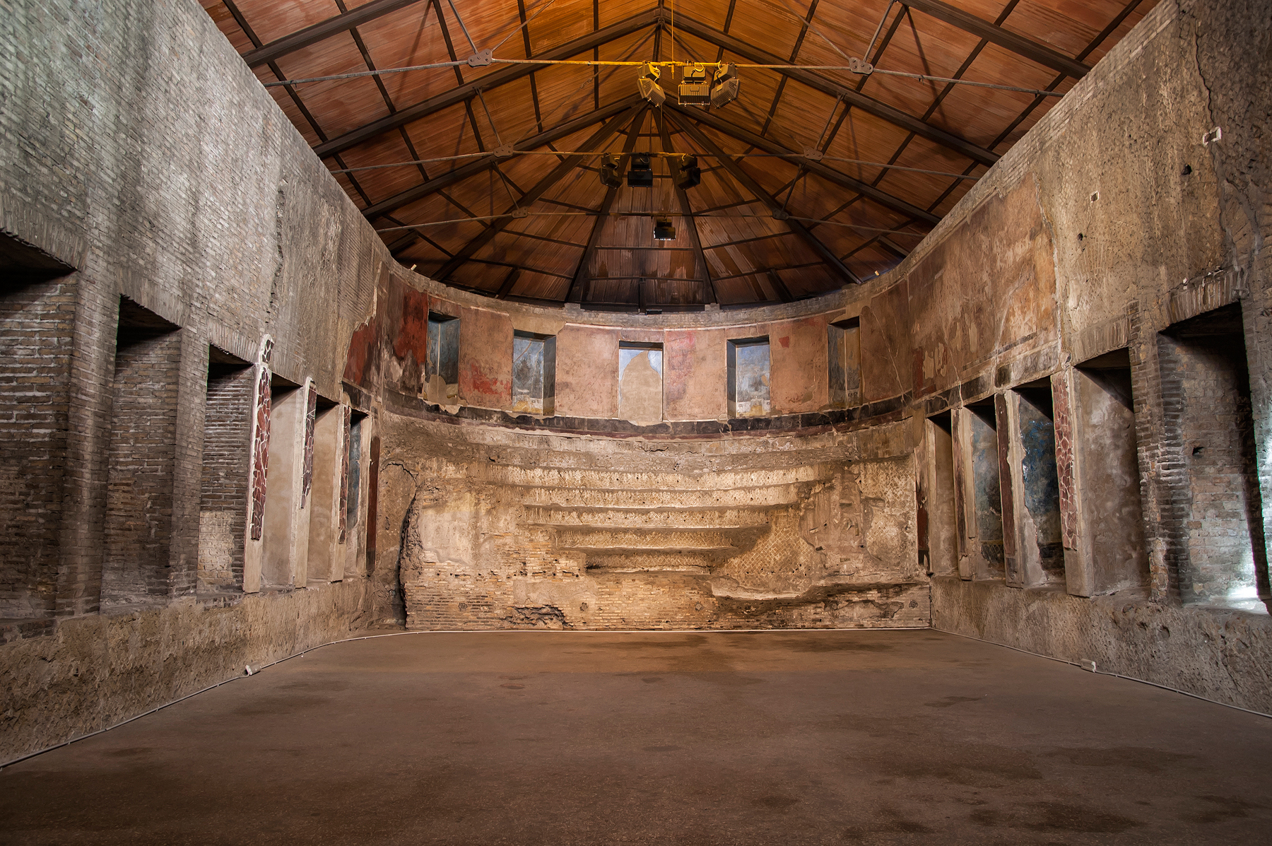 Auditorium di Mecenate This is a photo of a monument which is part of cultural heritage of Italy.